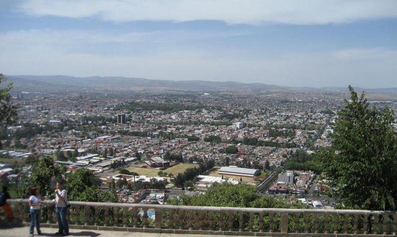 Vista de Morelia desde Santa María / Morelia view from Santa María Hill.